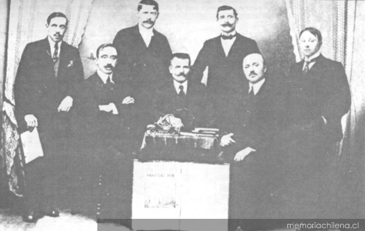 Directorio del semanario "Domovina", de la comunidad croata de Punta Arenas, 1916.